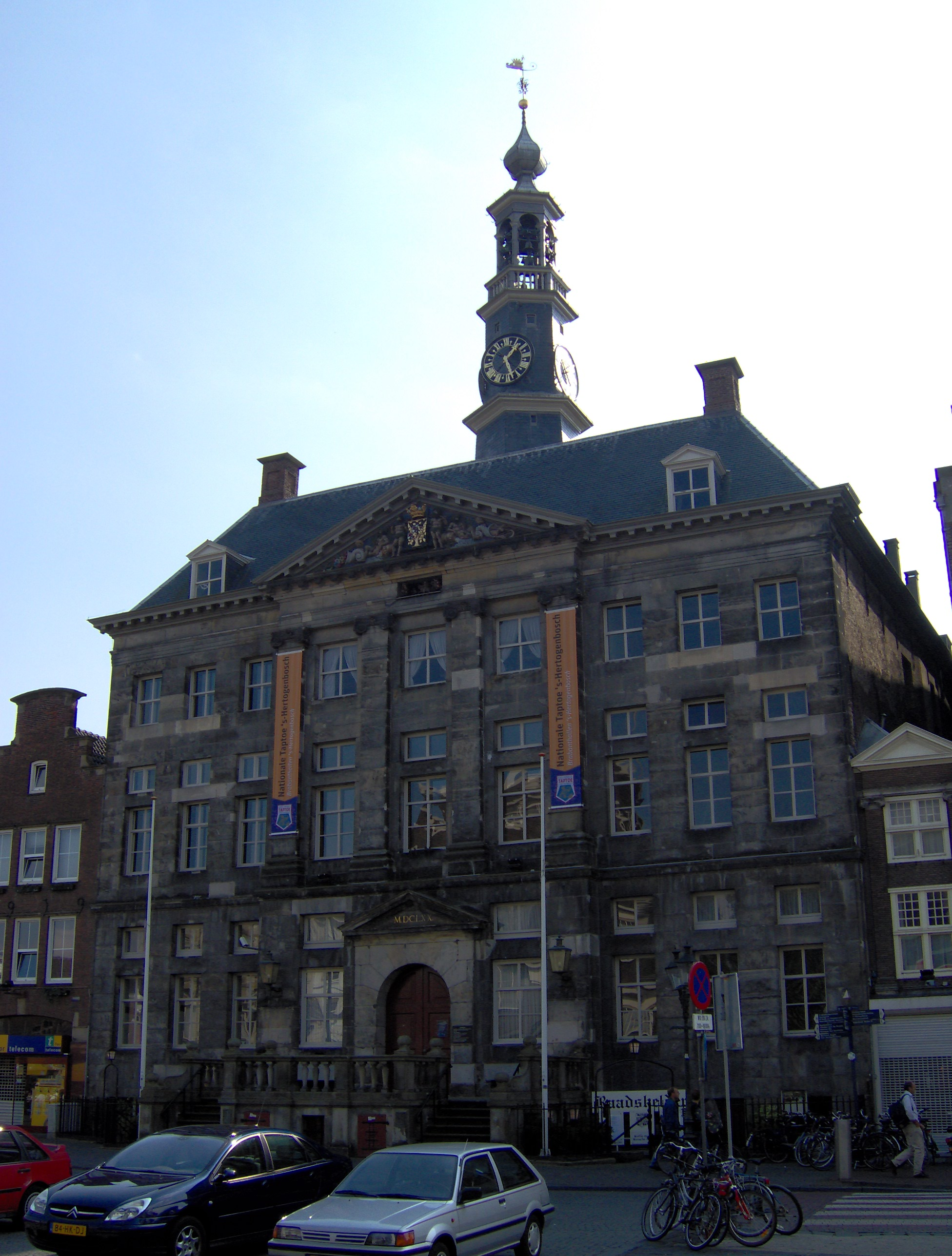 eigen foto Stadhuis 's-Hertogenbosch